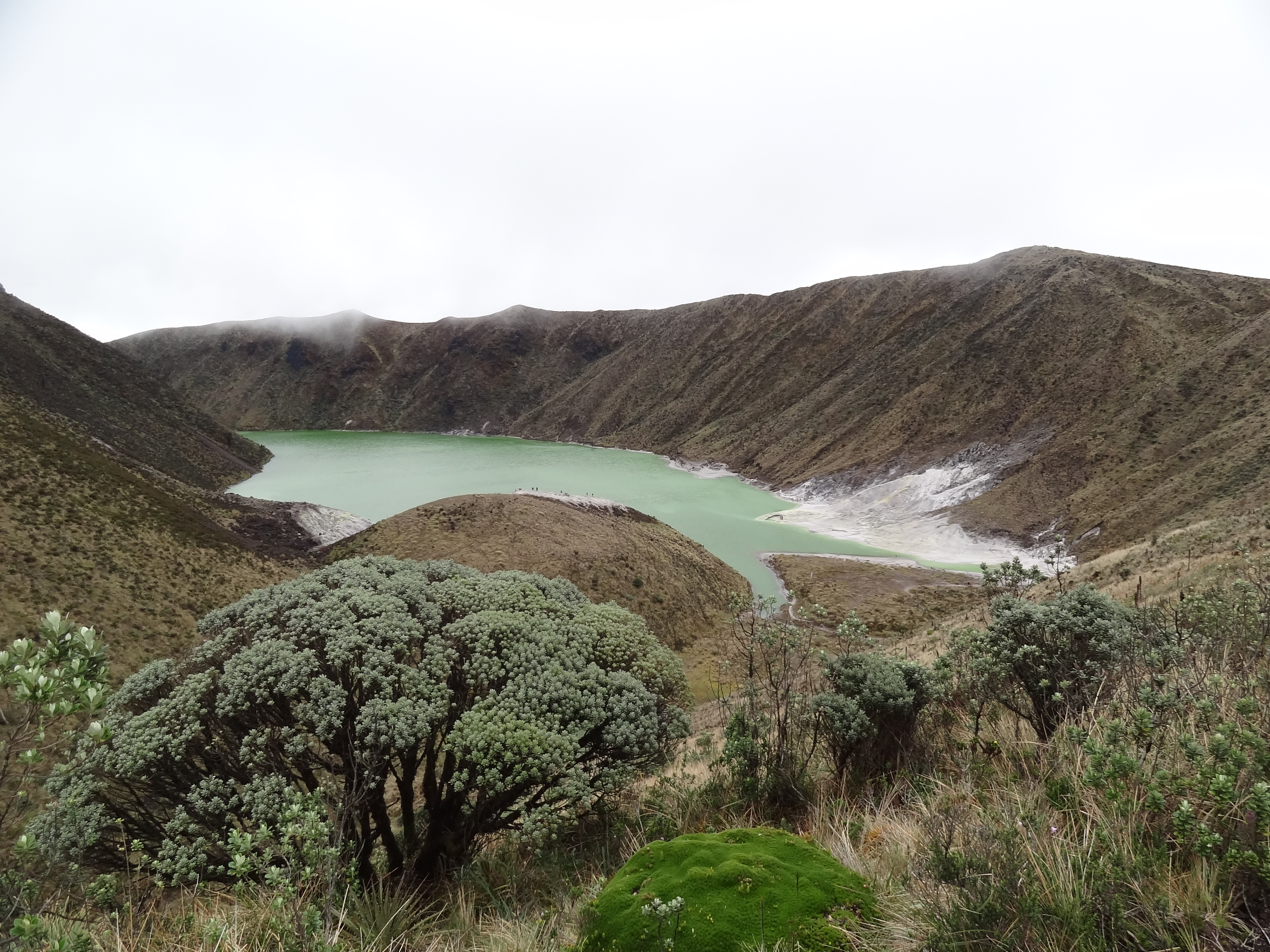 Esta fotografía fue tomada en el municipio colombiano con código 52435.